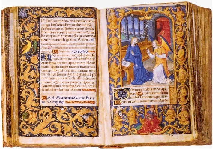 Très Petites Heures d'Anne de Bretagne. Annonciation. fol. 40v-41